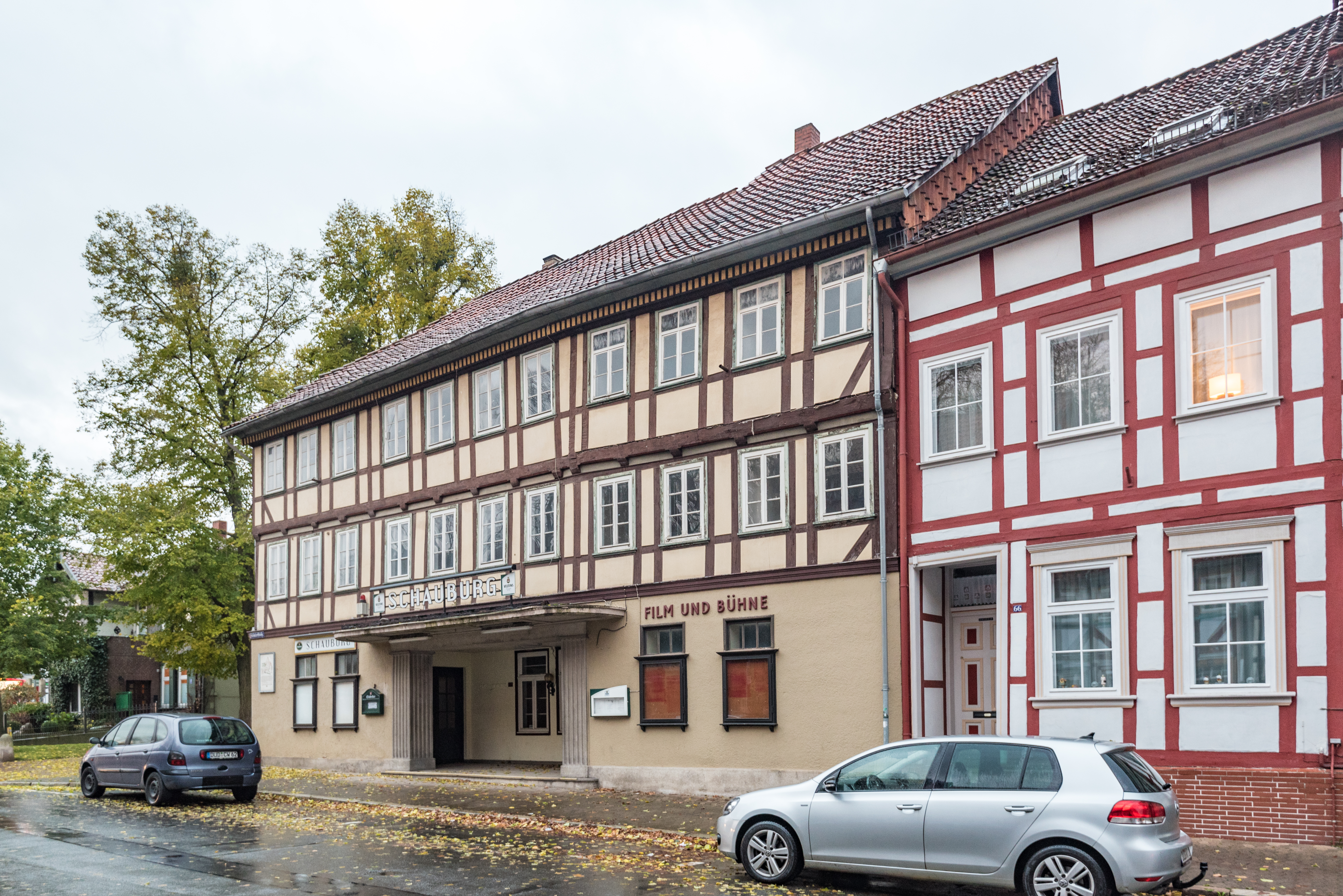 Duderstadt, Steintorstraße 68